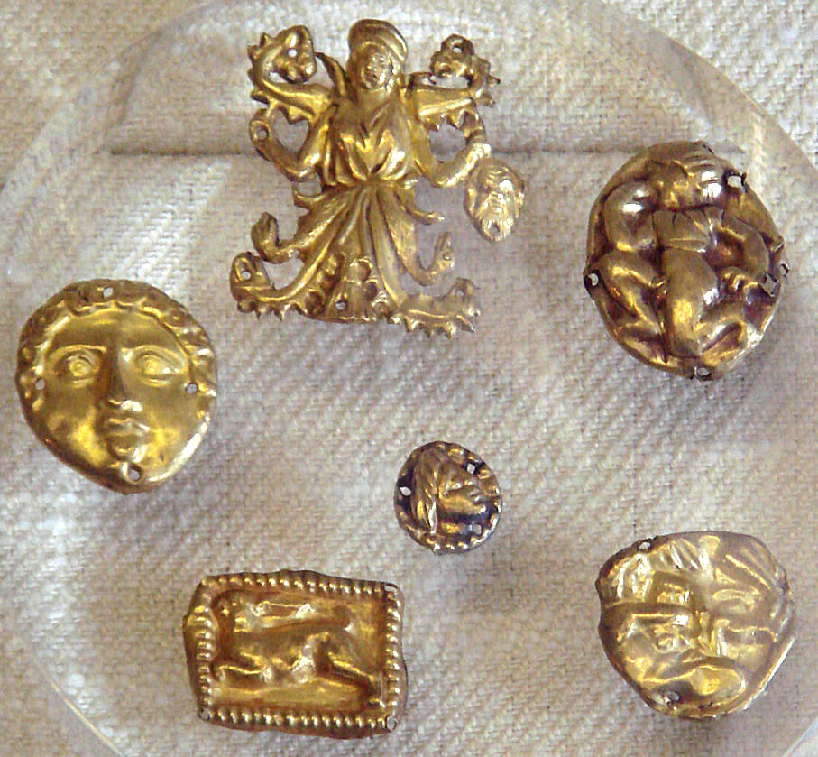 Kul-Oba treasure. Cabinet des Medailles, Paris.